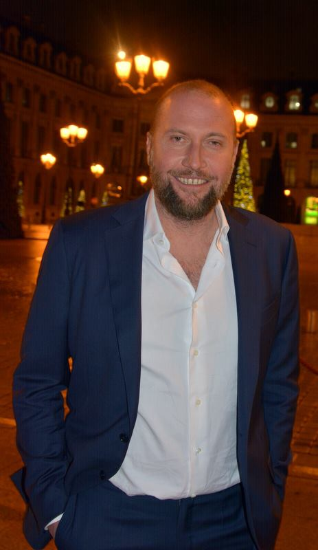 François Damiens au dîner des révélations des César du cinéma